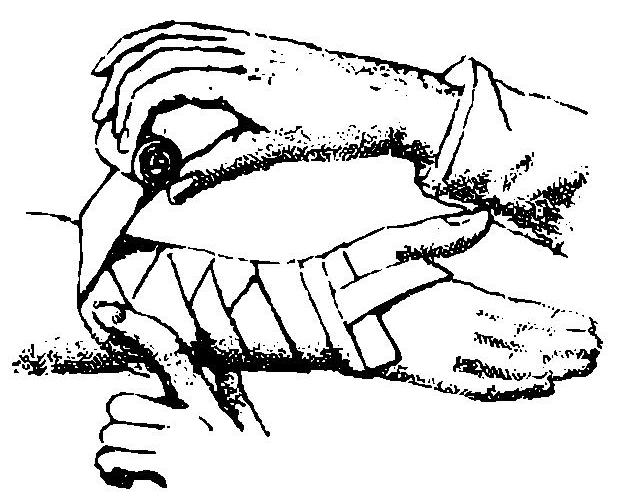 Modo de aplicar una venda sobre el antebrazo (espiral invertida).